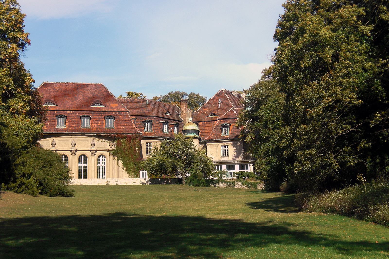 Schloss Marquardt ist von einem von Peter Joseph Lenné gestalteten Park umgeben. Von der Terrasse vor dem Festsaal fällt der Hang sanft ab zum Schlänitzsee.